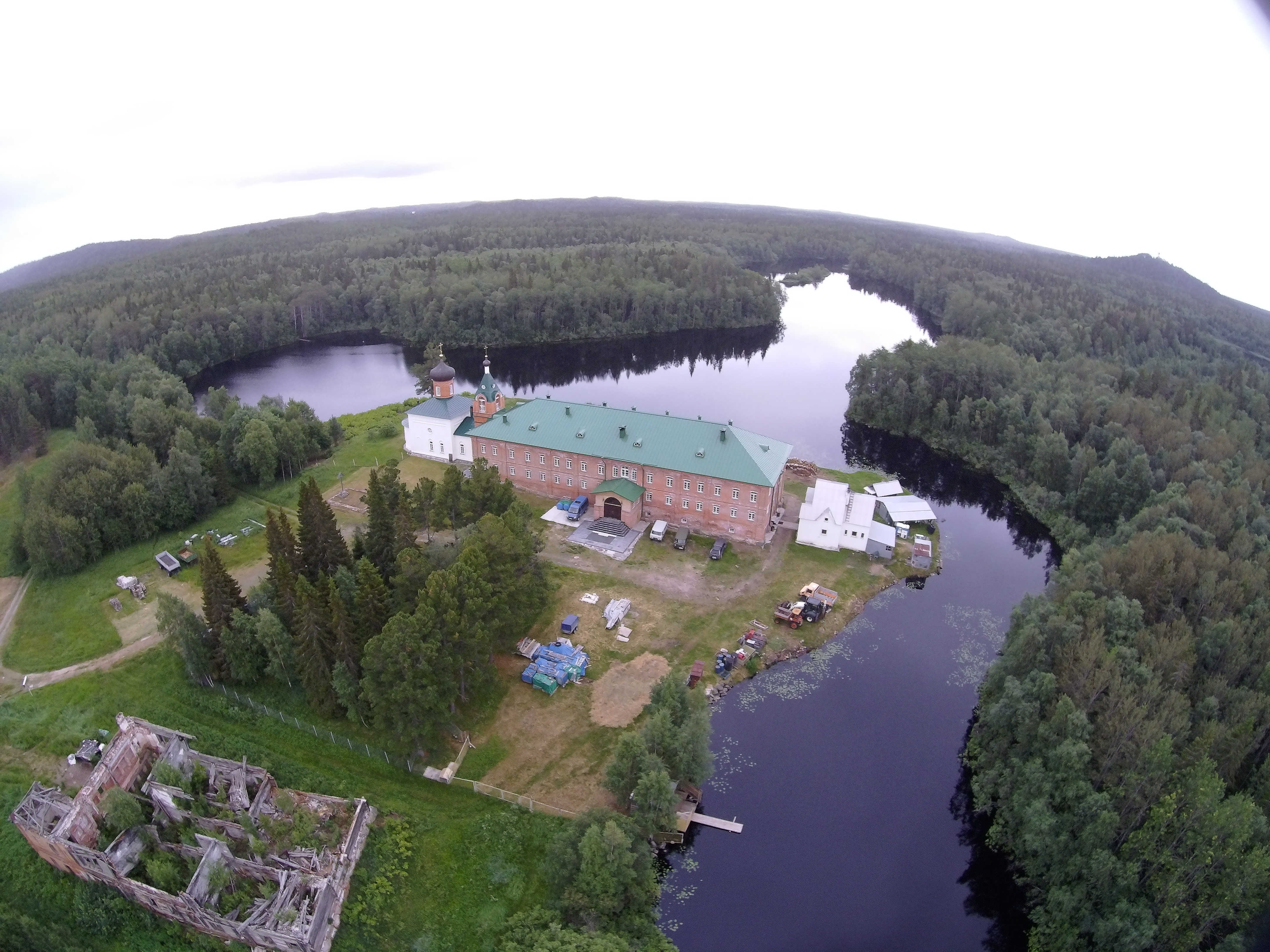 Letecký snímek poustevny